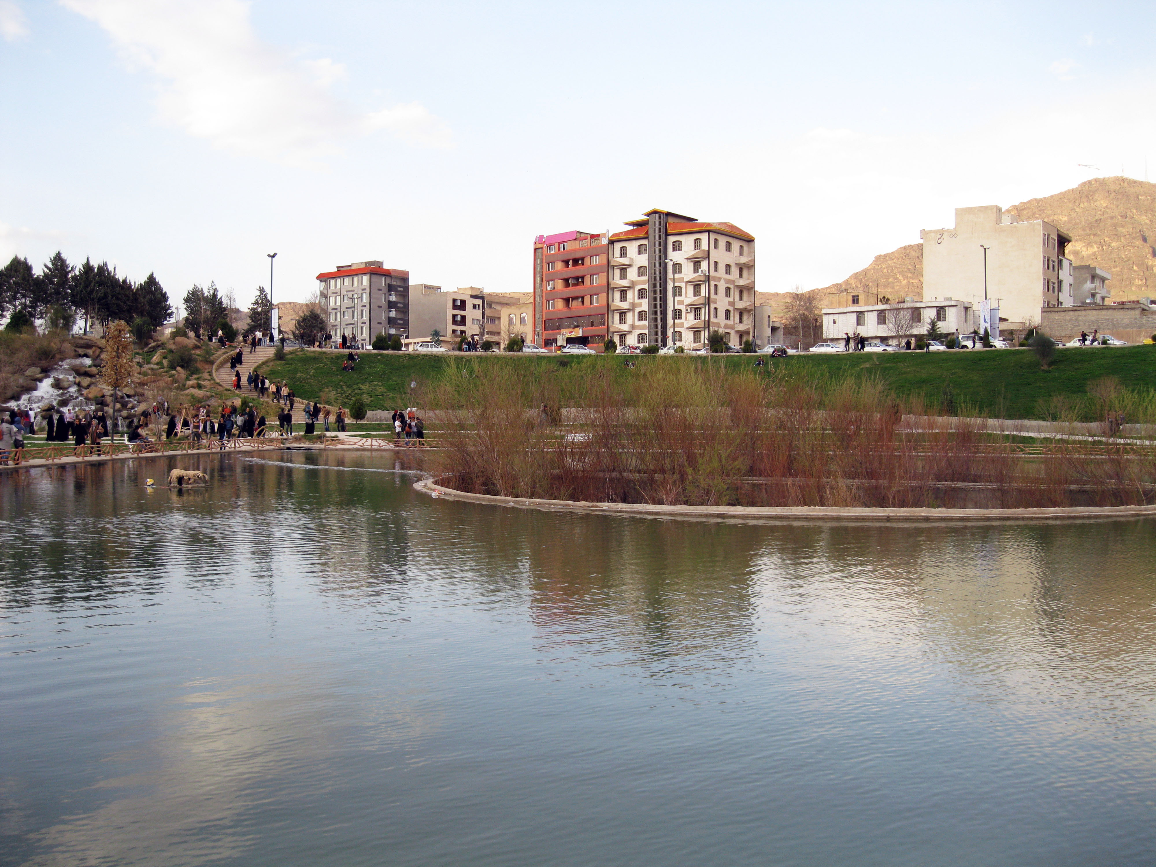 دریاچه کیو